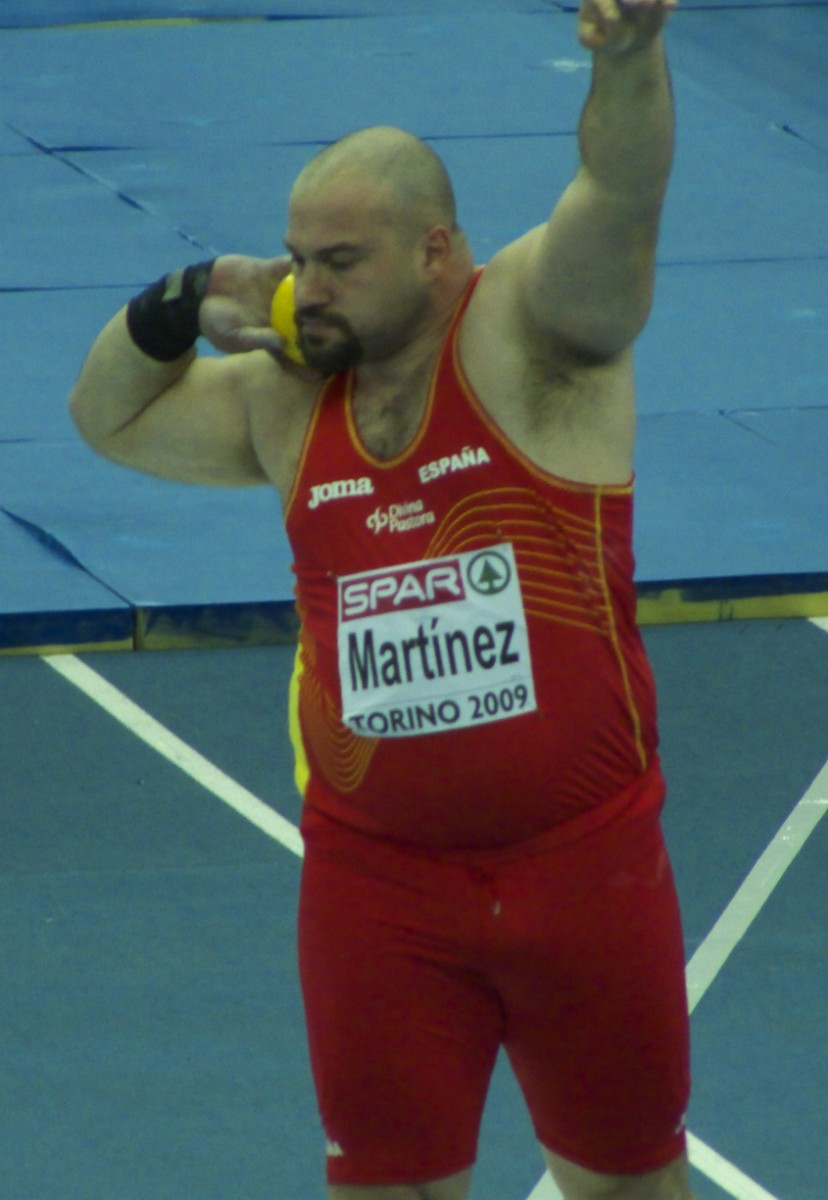 Campionati Europei Indoor Torino 2009